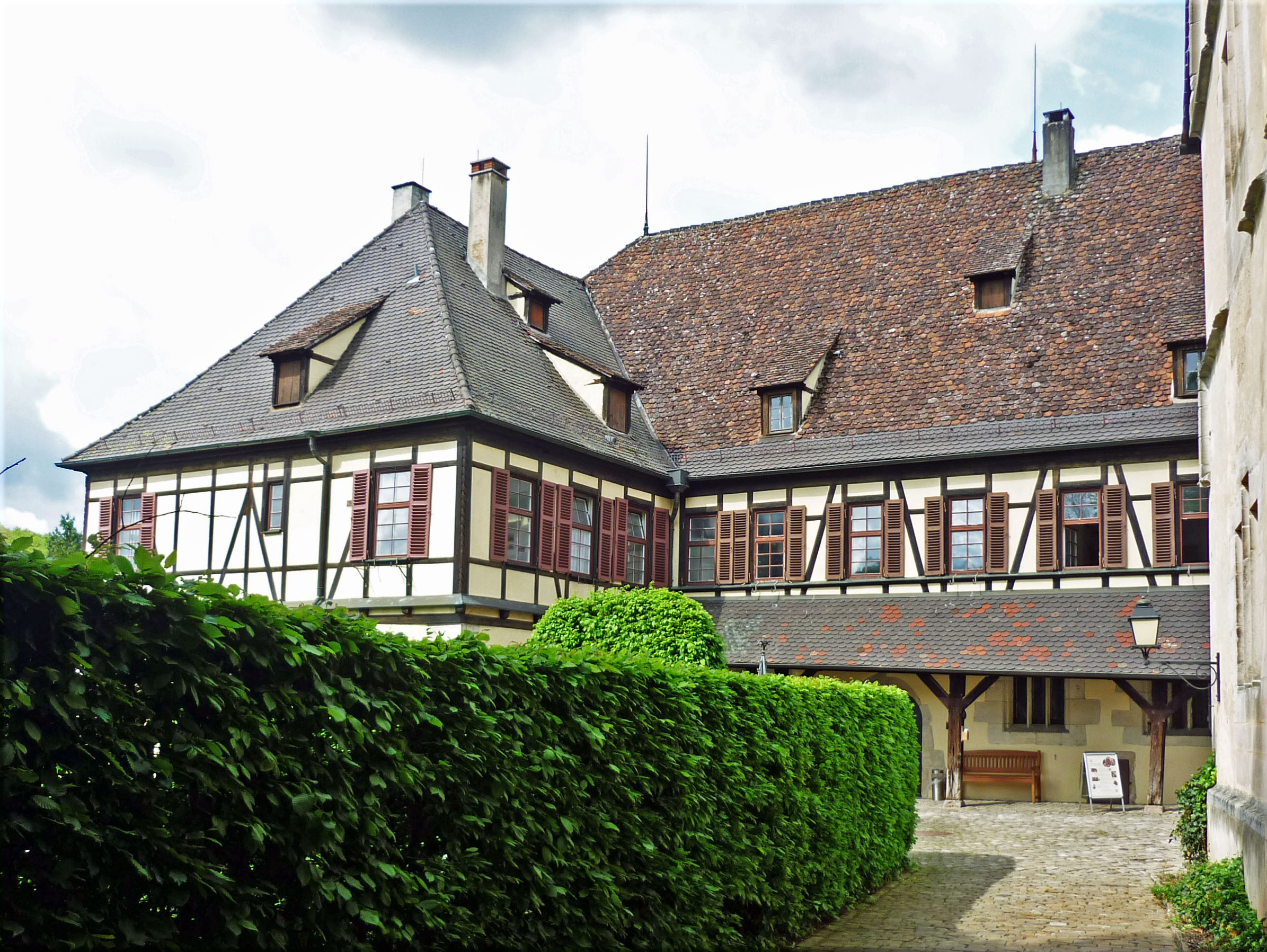 Schloss Bebenhausen (Bebenhausen, OT von Tübingen in Württemberg)